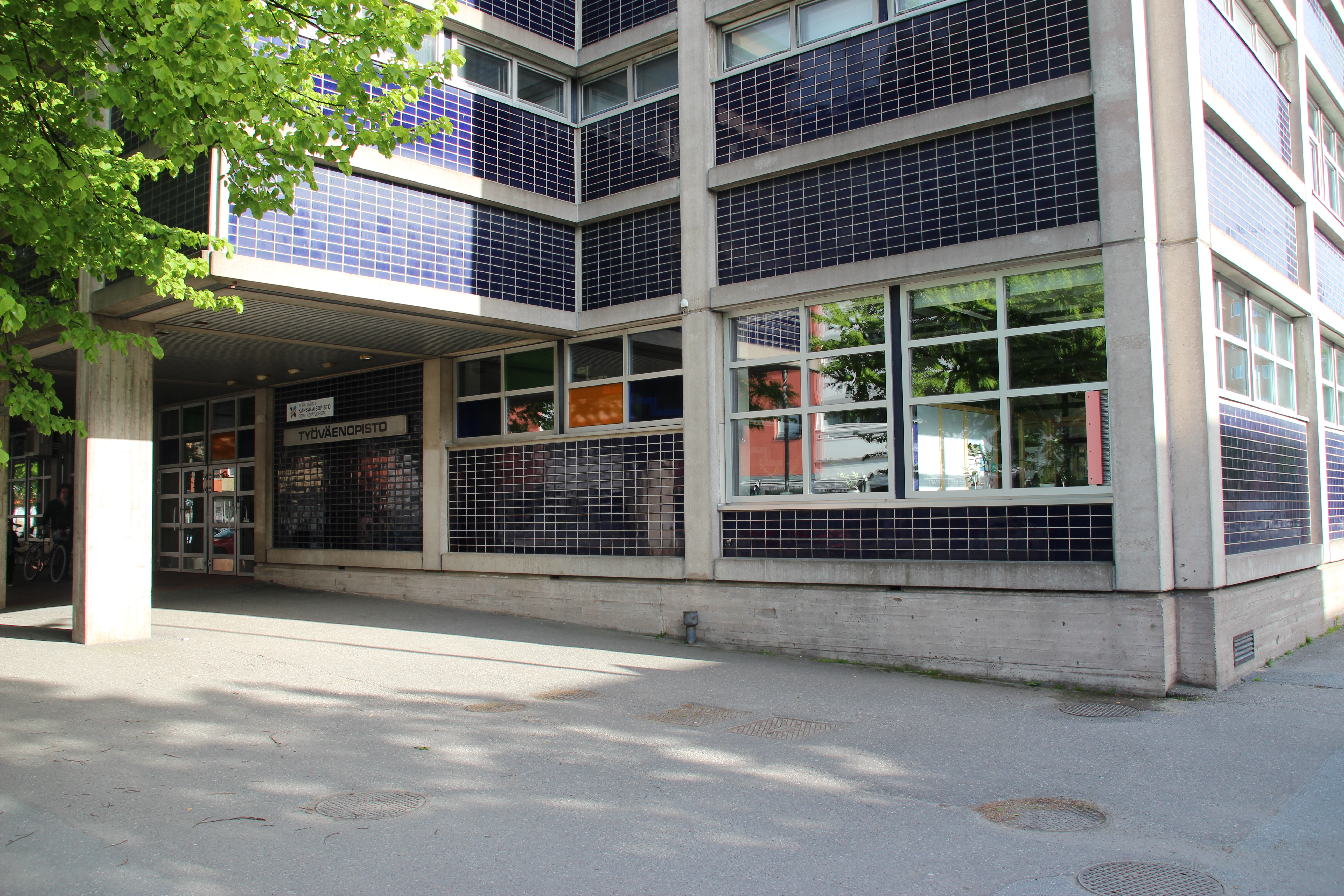 Porin seudun kansalaisopiston opistotalo, Gallen-Kallelankatu 14